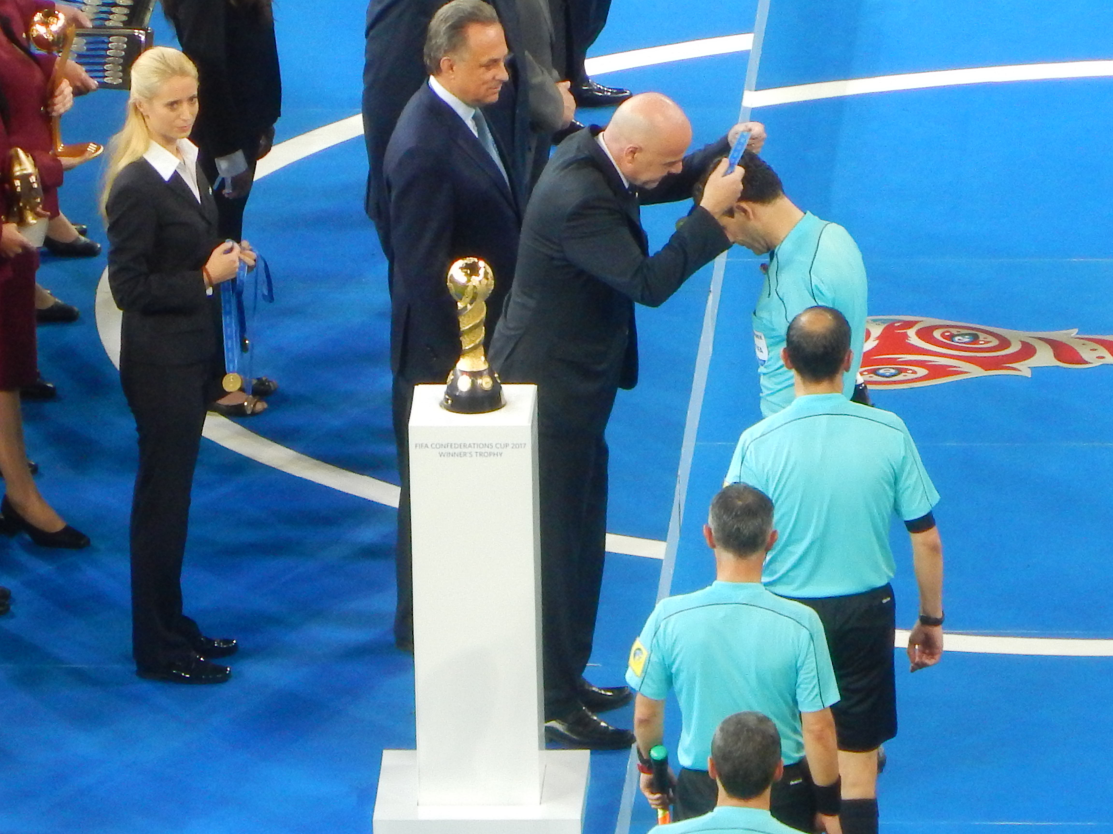 Финал Кубка конфедераций 2017